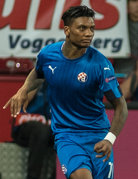 UEFA Champions League - Play-Offs - FC Salzburg vs Dinamo Zagreb. Bild zeigt Junior Fernandes (Dinamo Zagreb) und Christian Schwegler (RBS).